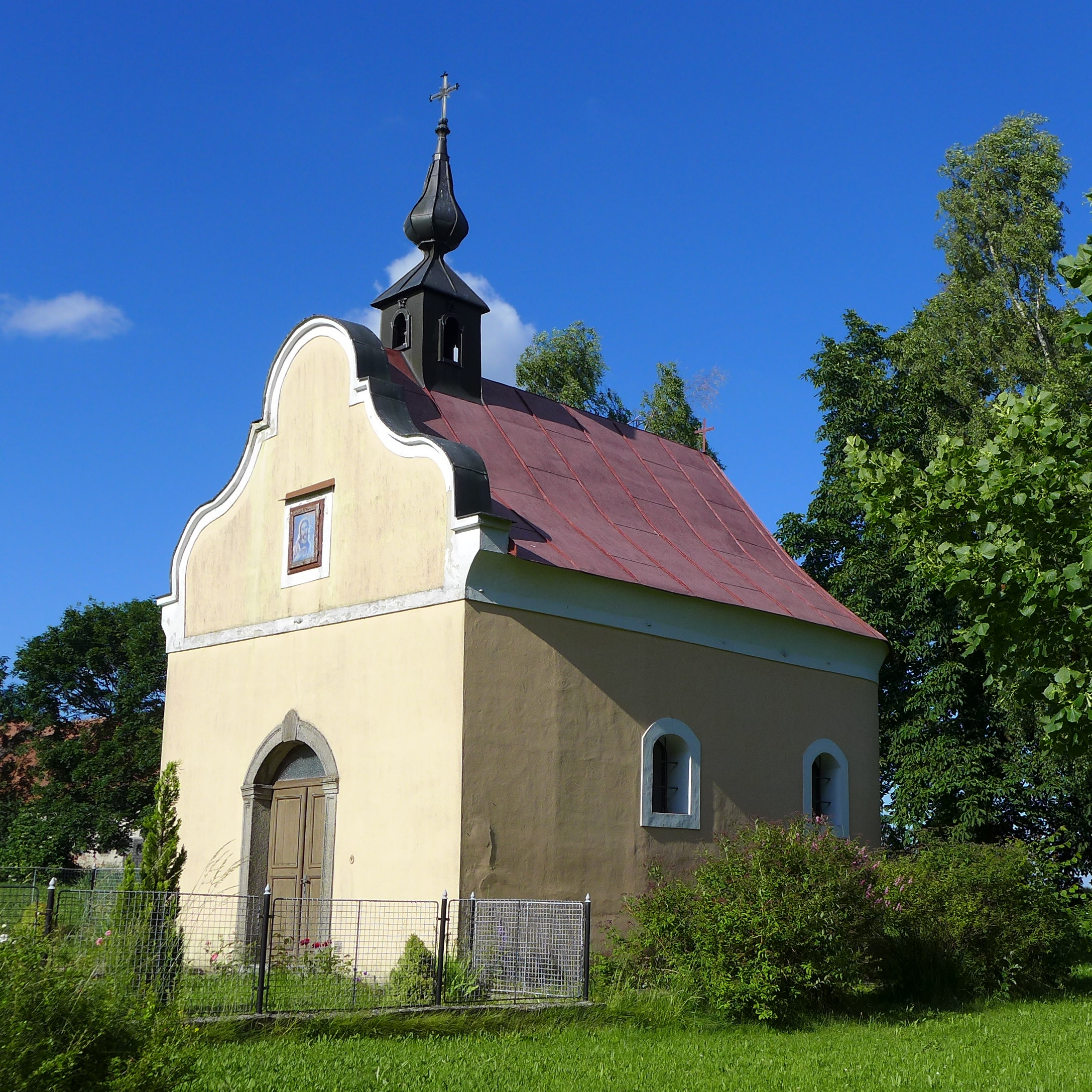 Kaple, náves, Zdeňkov.